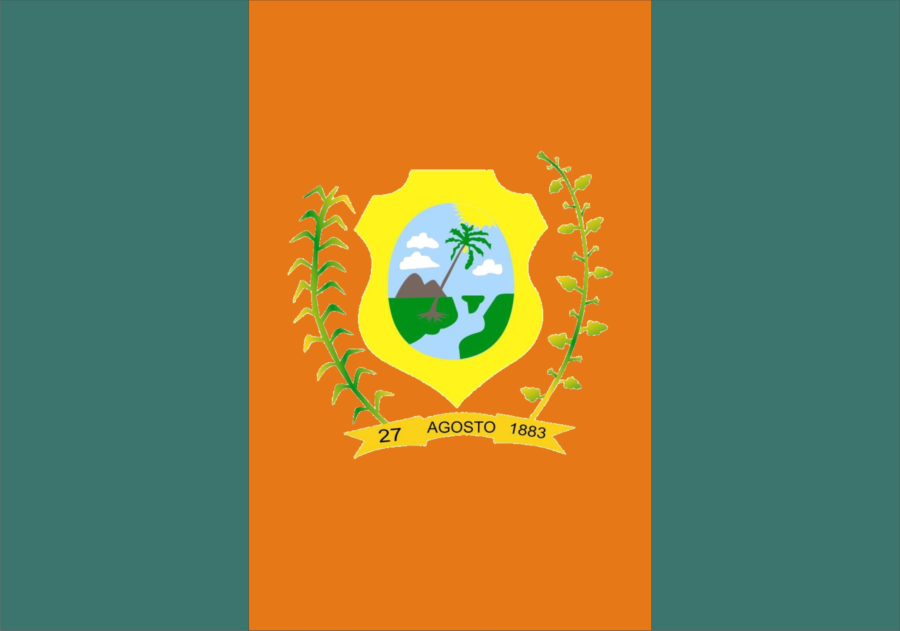 Bandeira da Cidade das Correntes, situada no Estado de Pernambuco.